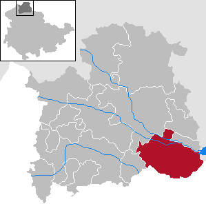 Stadt Heringen/Helme in Thüringen, Landkreis Nordhausen